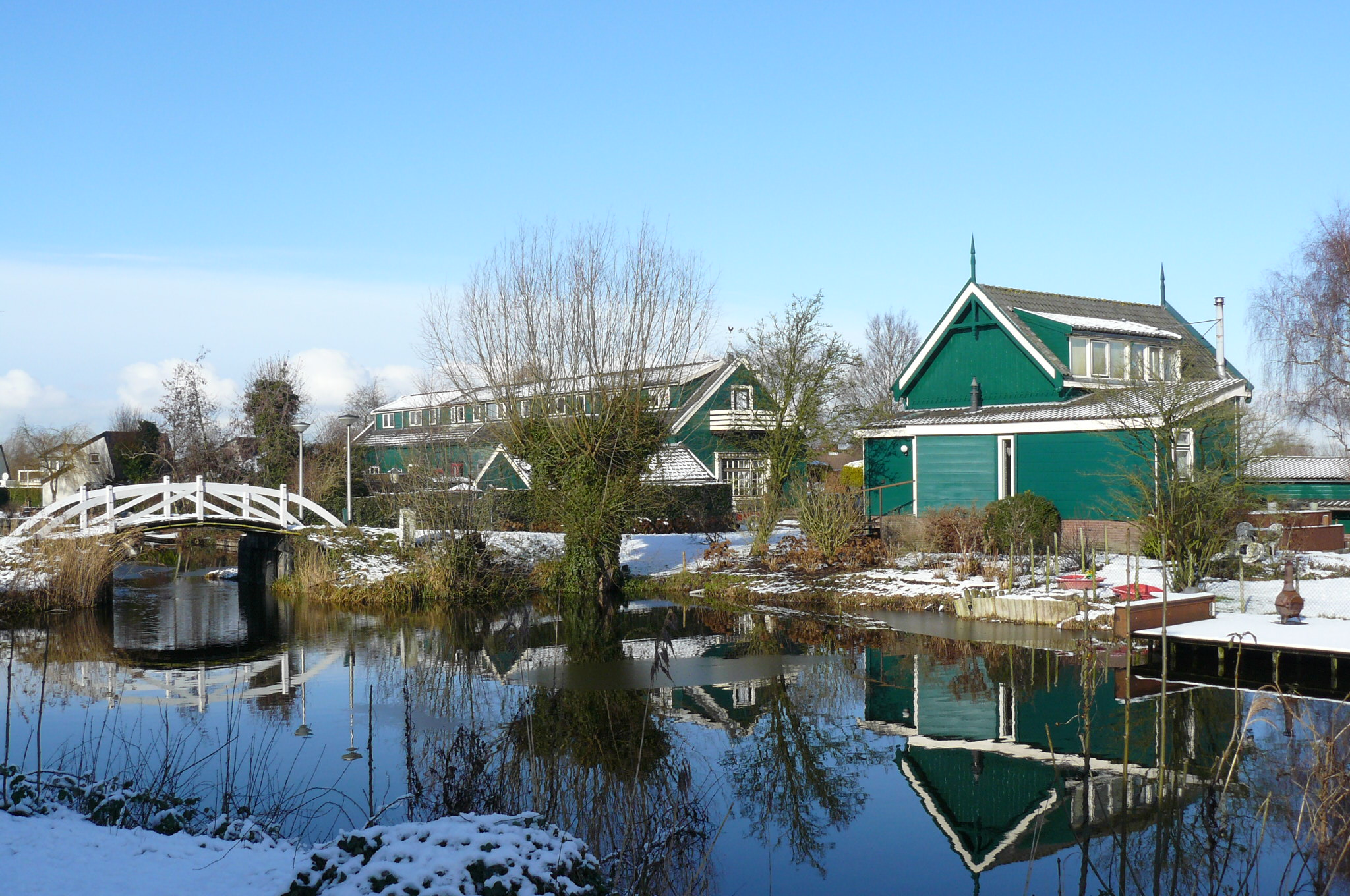 Rechts de fortwachterwoning en links de genieloods die tot woningen is verbouwd. De foto is genomen vanaf het hoofdgebouw van het fort.